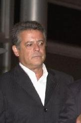 Marcos Paulo, Brasília, 2003.